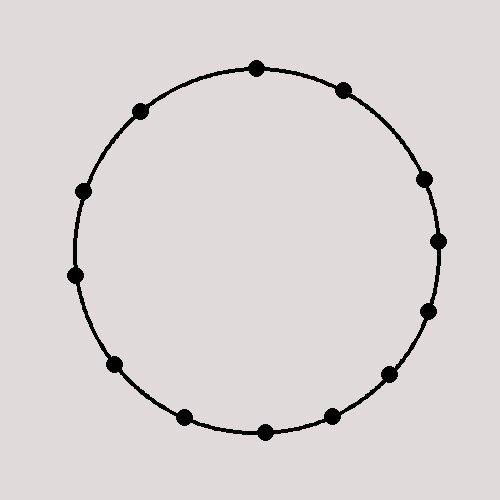 Circle-system